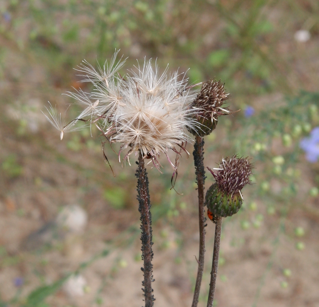 Cirsium pannonicum, (Fruchtstand) im Botanischen Garten Hamburg